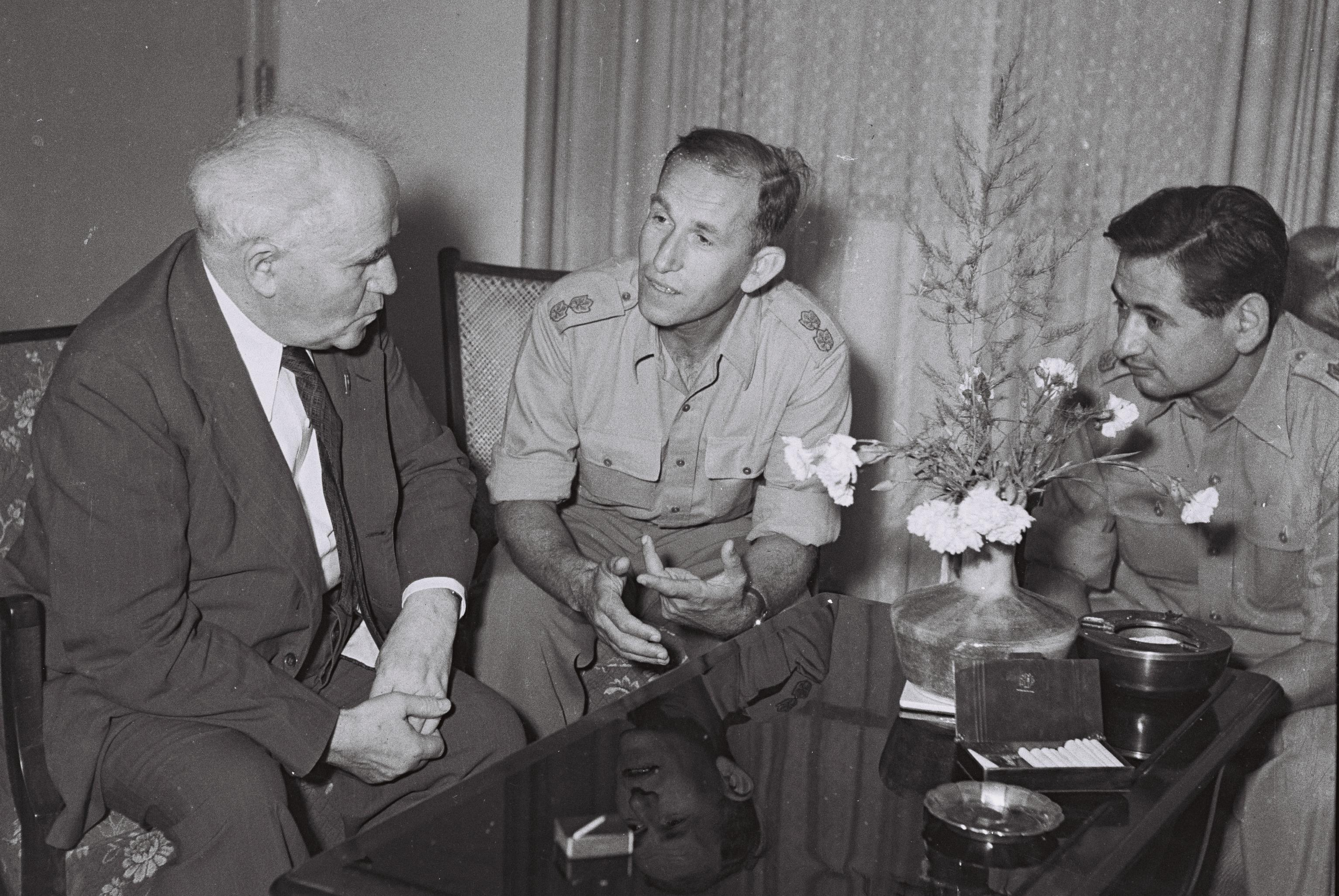 קצין אפסנאות ראשי סא"ל אפרים בן ארצי, קצין רפואה ראשי סא"ל חיים שיבא וראש הממשלה דוד בן-גוריון